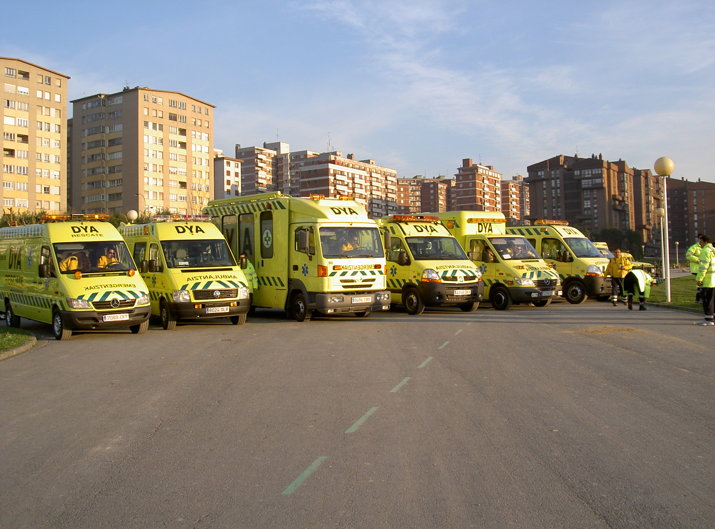 Recursos de DYA en Bizkaia